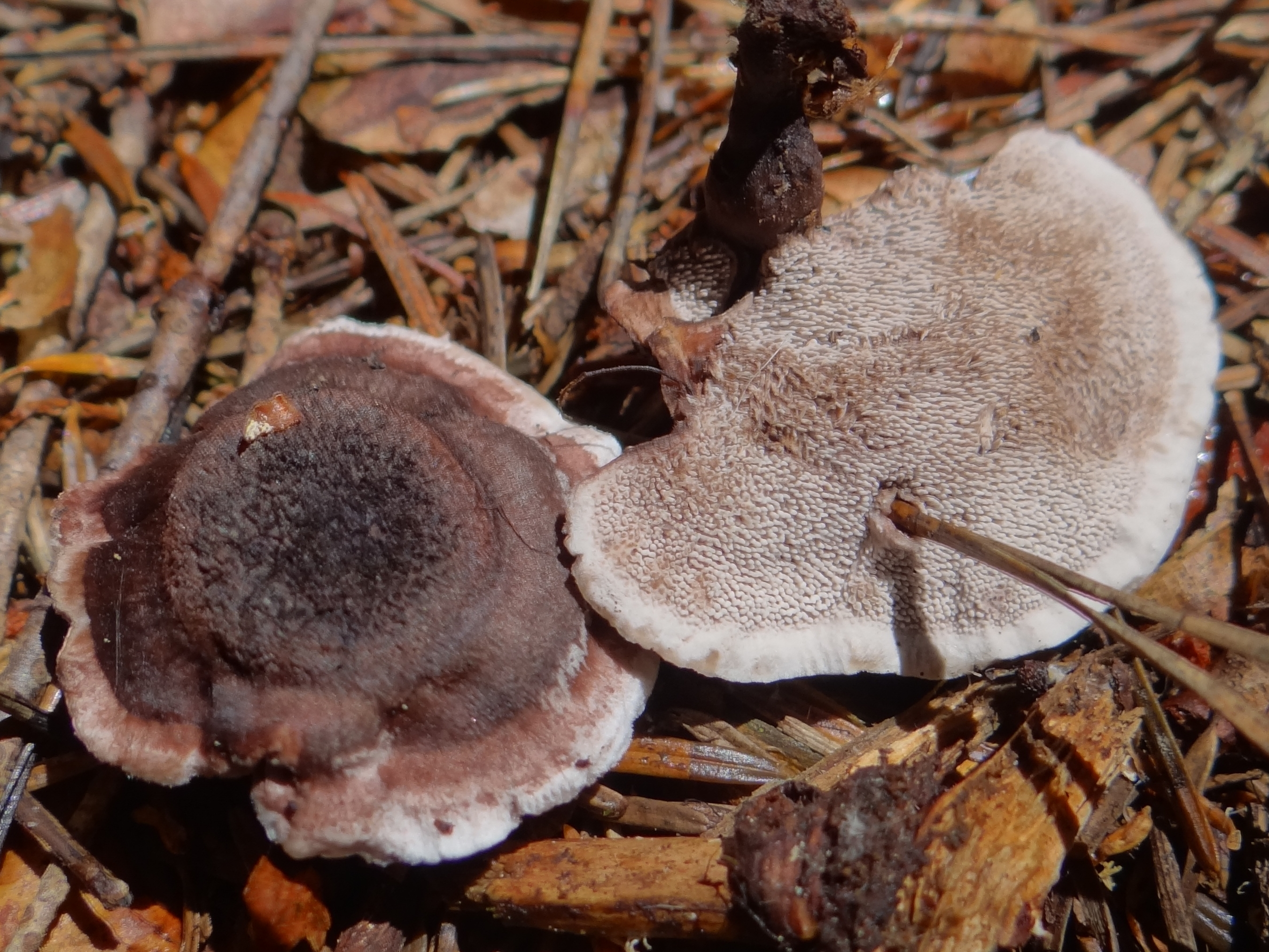 Phellodon tomentosus